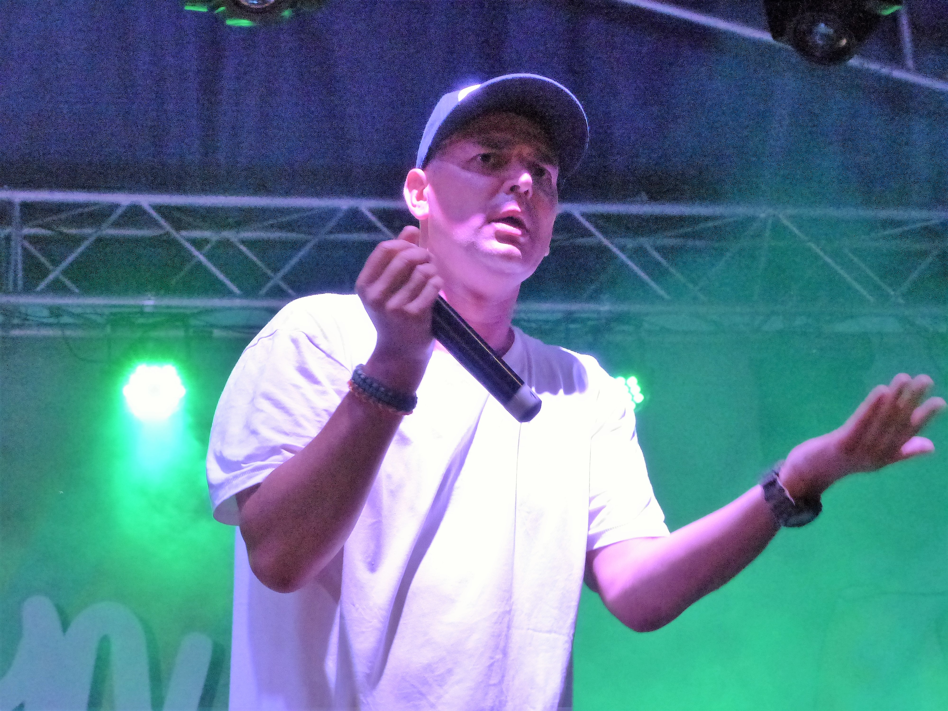 Qka. Animal Cannibals - Qka – Koller László, Ricsipí - Dósa Richárd A felvétel 2017. június 29-én, csütörtökön készült Balatonkenesén. Először rendezték meg Balatonkenesén a Balaton fesztivált. A 2017. június 29 -től július 2-ig tartó fesztivál első napján hip-hop együttesek léptek fel - Sub Bass Moster, Animal Cannibals, Akkezdet Phiai. A második napon, 30-a, pénteken indie pop, rock fellépők: Queen's Land, Firkin, Lord, Reckless Roses. A harmadik nap fellépői: Groovehouse, UFO, Kozmix. A negyedik napon a Varnyú Country, a Mokka Tribute, a Republic és a Balkan Fanatik együttesek játszottak.